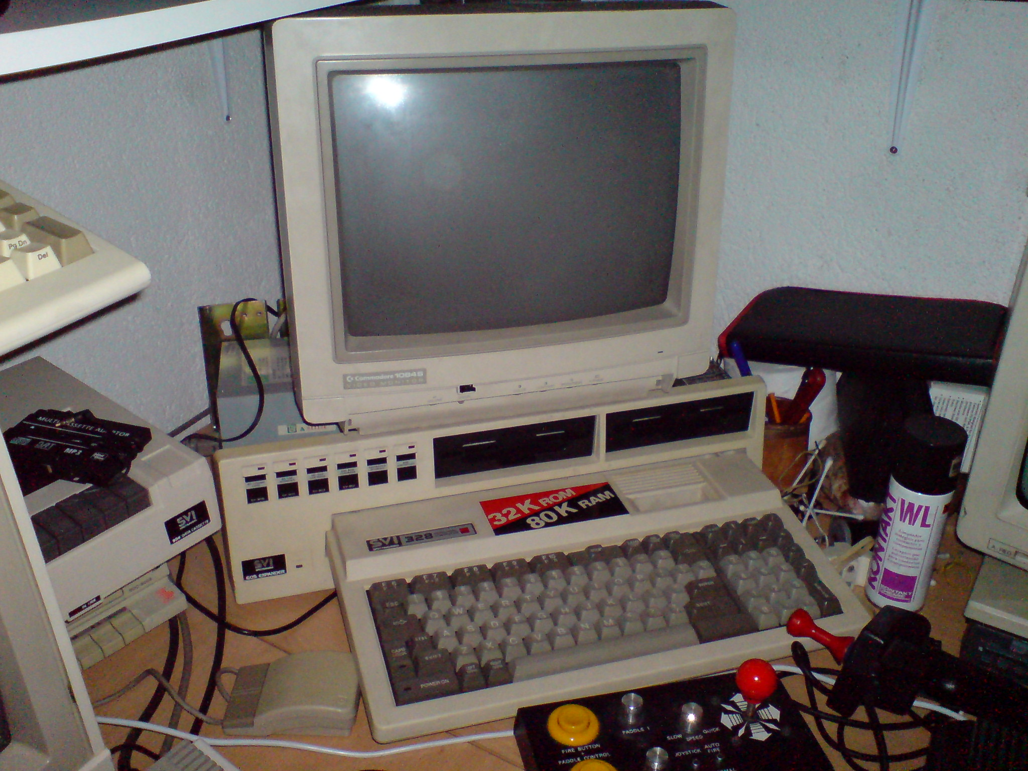 Spectravideo SVI-328 con SuperExpander